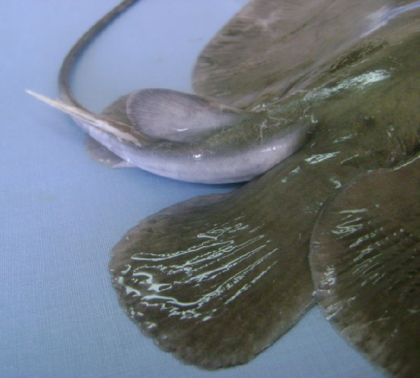 Aetobatus flagellum, скат рода орляковых скатов